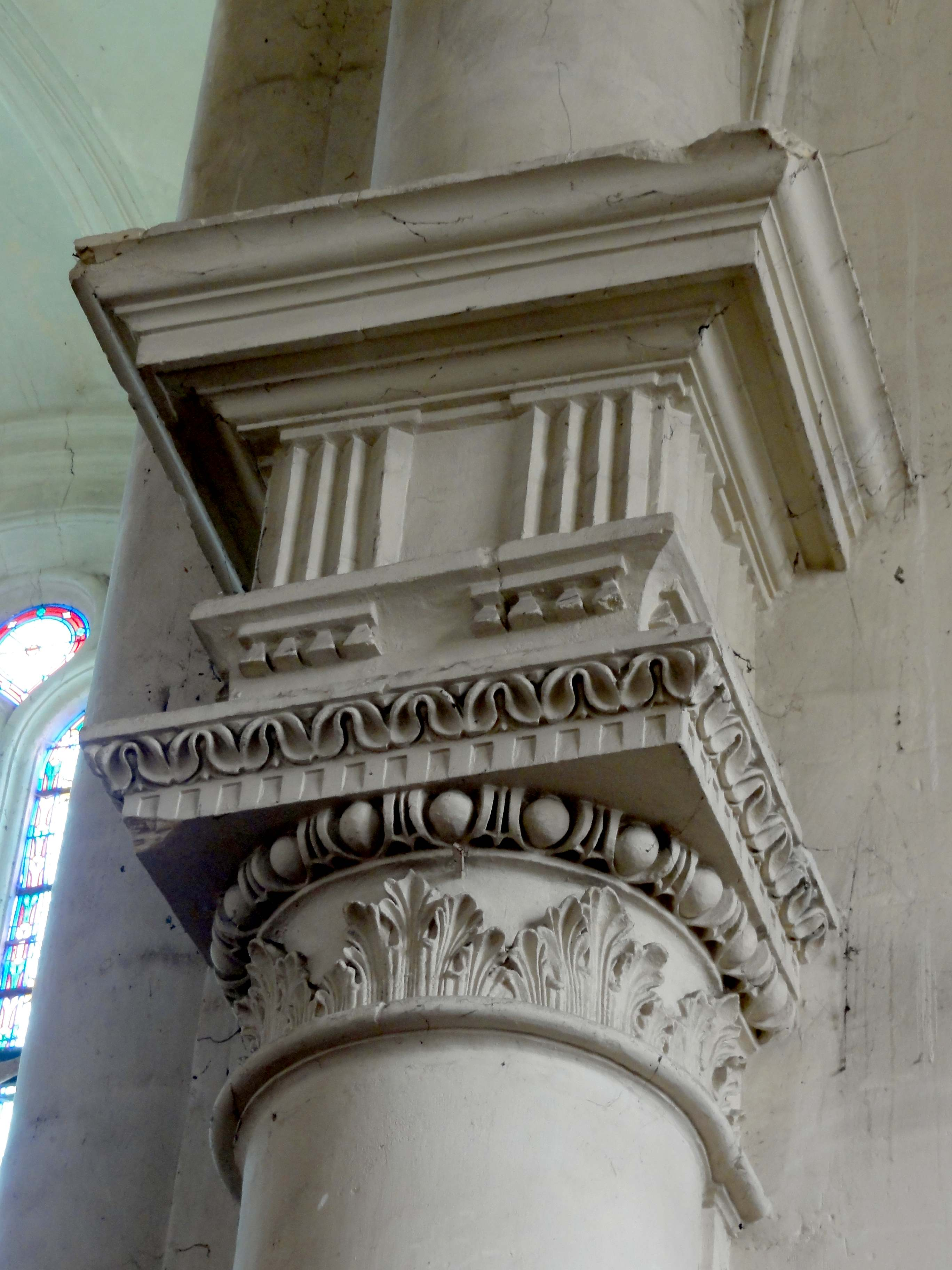 Chapelle sud, chapiteaux côté est.